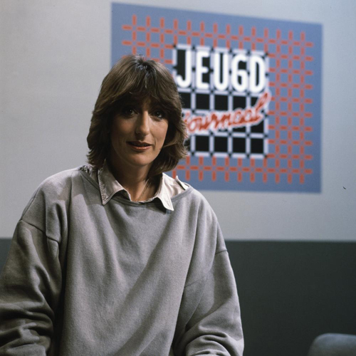 Marga van Praag in 1984. Zendgemachtigde NOS. Archief Beeld en Geluid, catalogusnummer FTA001051165, fotonummer 3, oorspronkelijk archiefnummer 84716